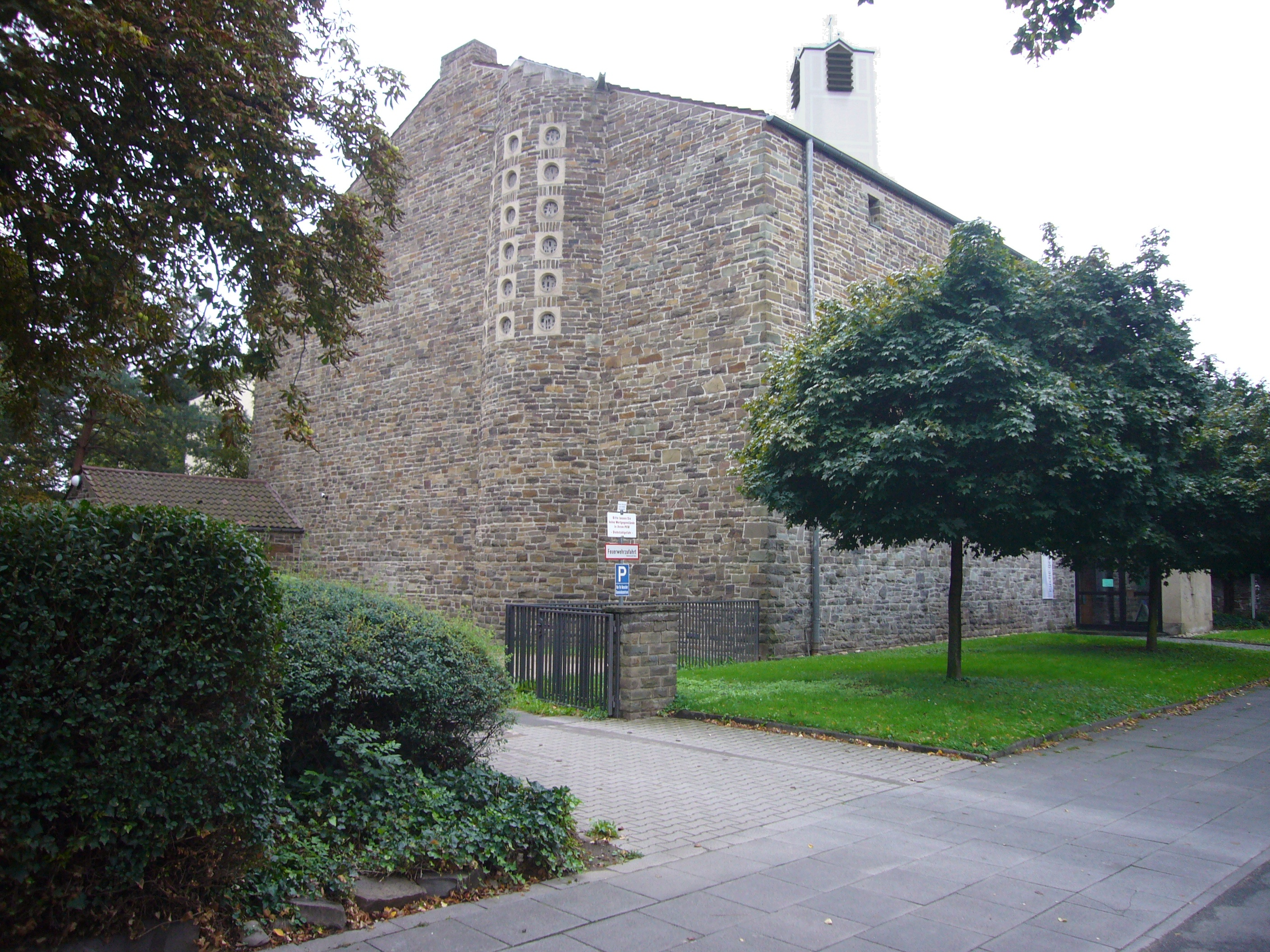 Evangelische Lukaskirche, Kaiser-Karl-Ring 25 (Ecke Nordstraße), Bonn-Castell